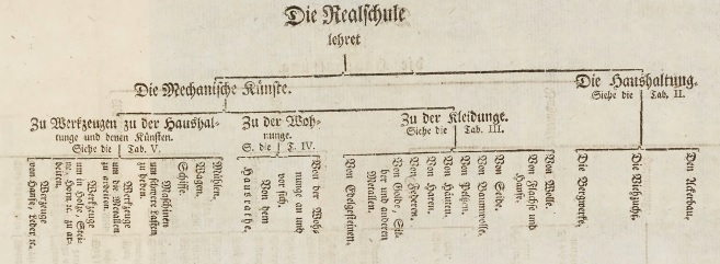 Johan Jacob Reinhards Marggrävl. Baden-Durlachischen würklichen geheimden Raths vermischte Schriften, 2. Auflage, Frankfurt und Leipzig, 1765, Tab. I nach S. 166 - Lehrplan für Realschulen